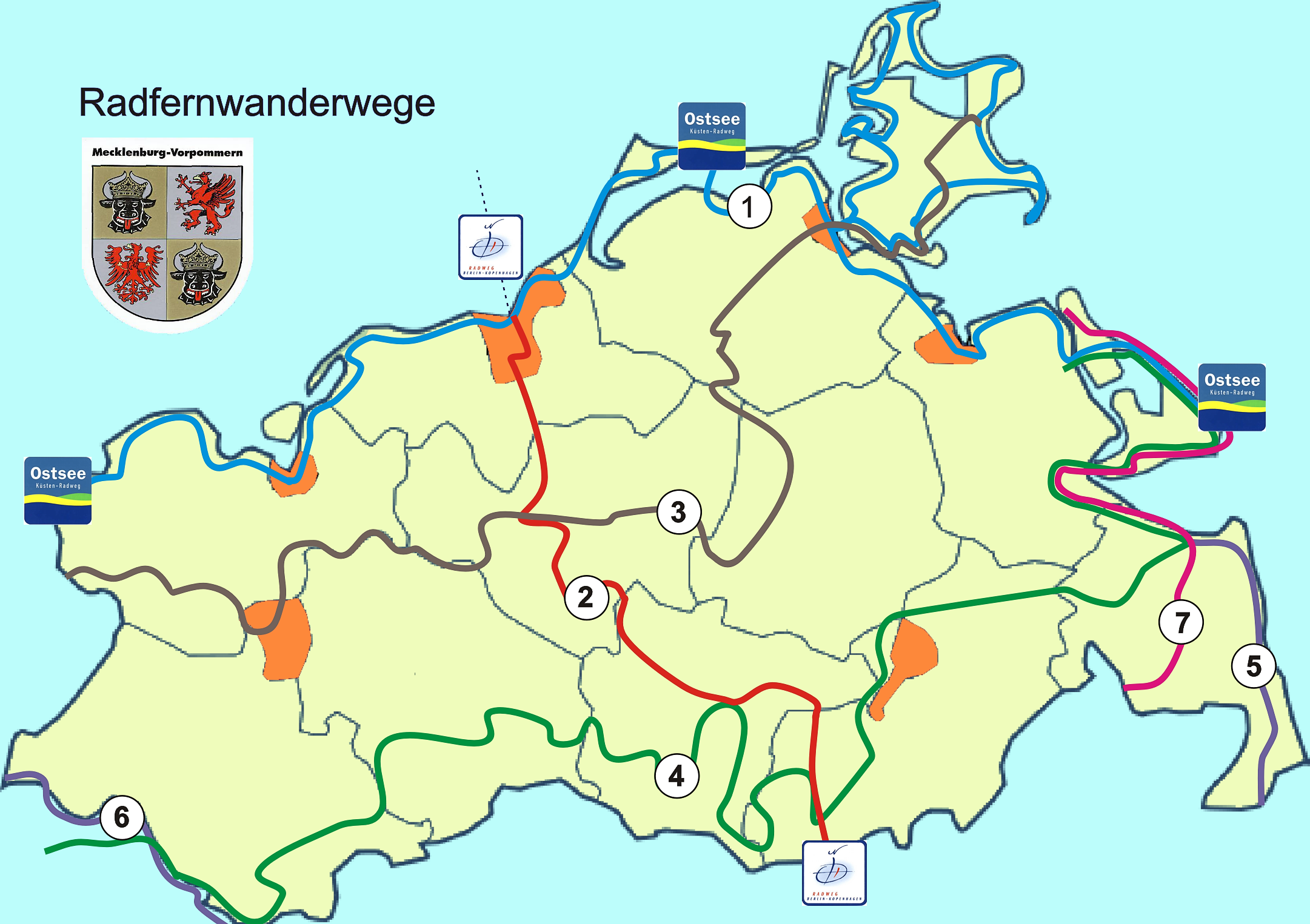 Übersicht Radwanderwege Mecklenburg-Vorpommern